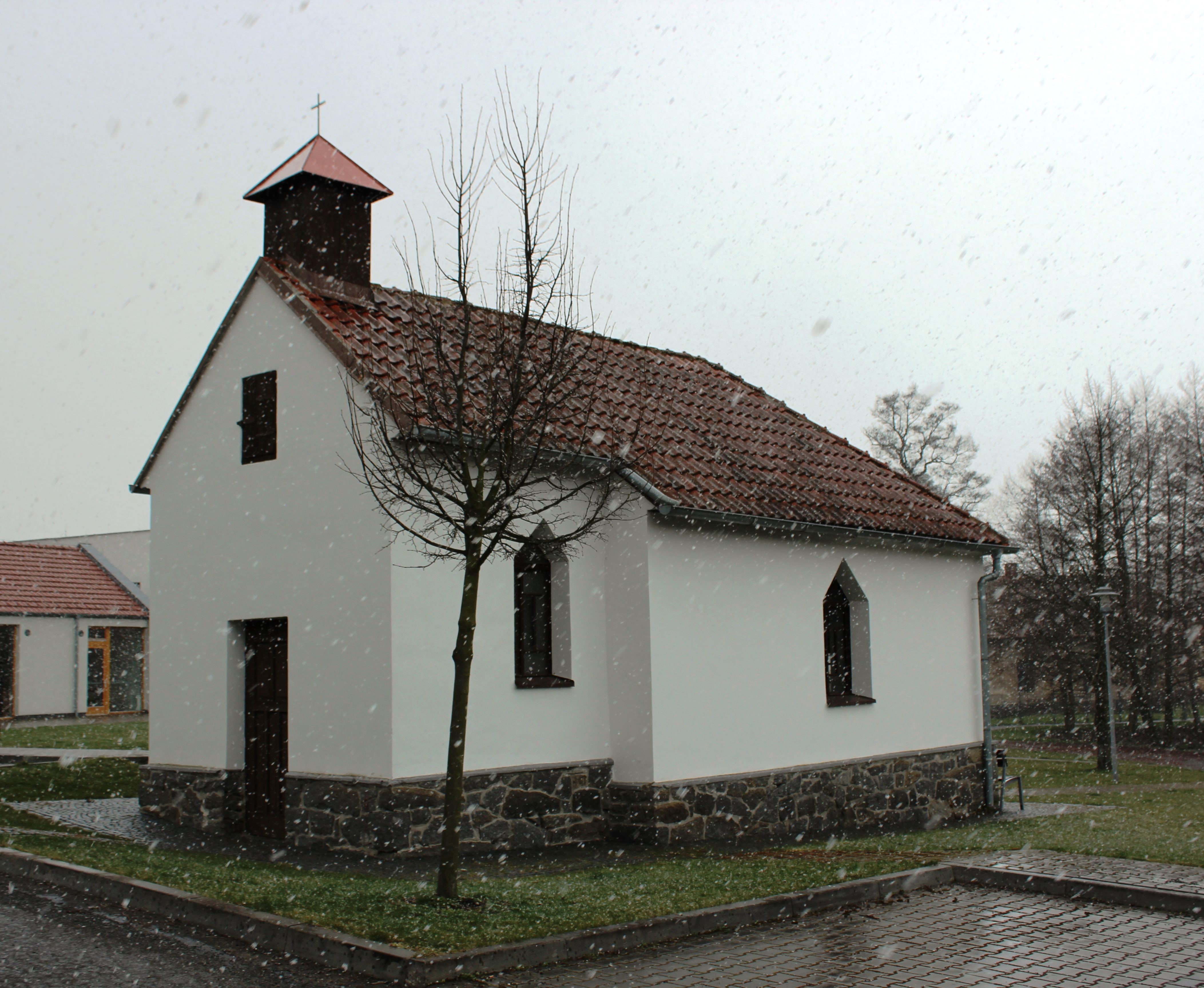 Kaple. Štětkovice. Okres Příbram. Česká republika.